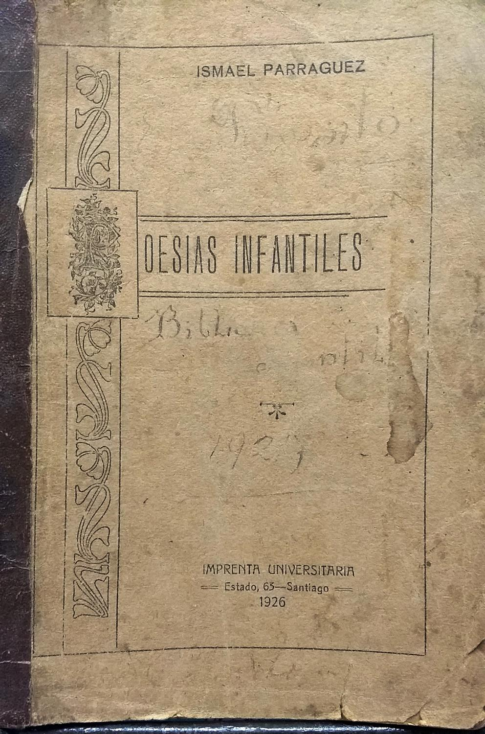 Portada del libro